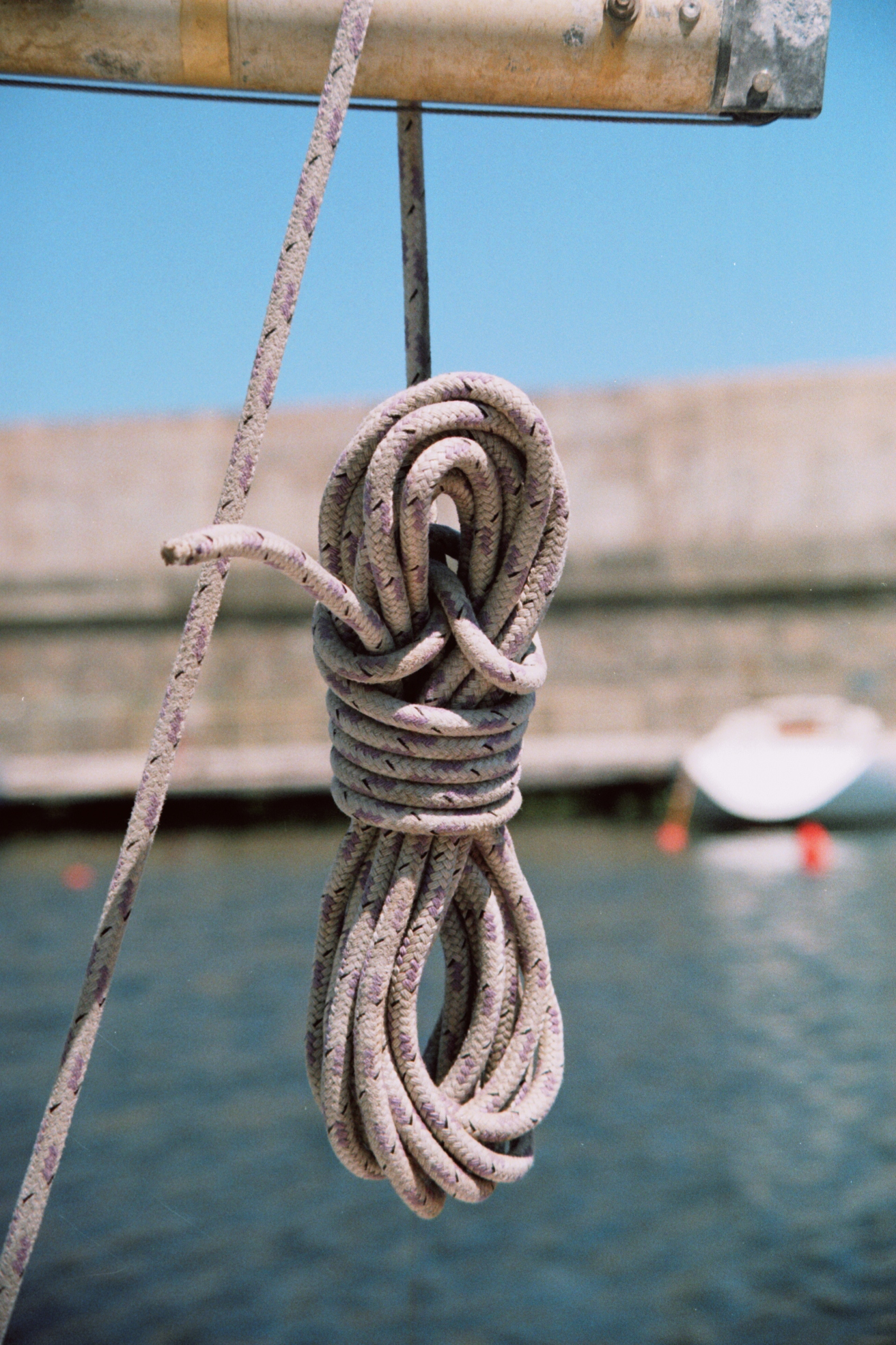 aufgeschossene Leine (Großschot), überm Großbaum hängend / un bout lové / coil knot